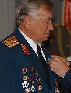 КУРСК. Вручение ордена Дружбы Герою Советского Союза, ветерану Великой Отечественной войны, участнику Курской битвы Михаилу Булатову.